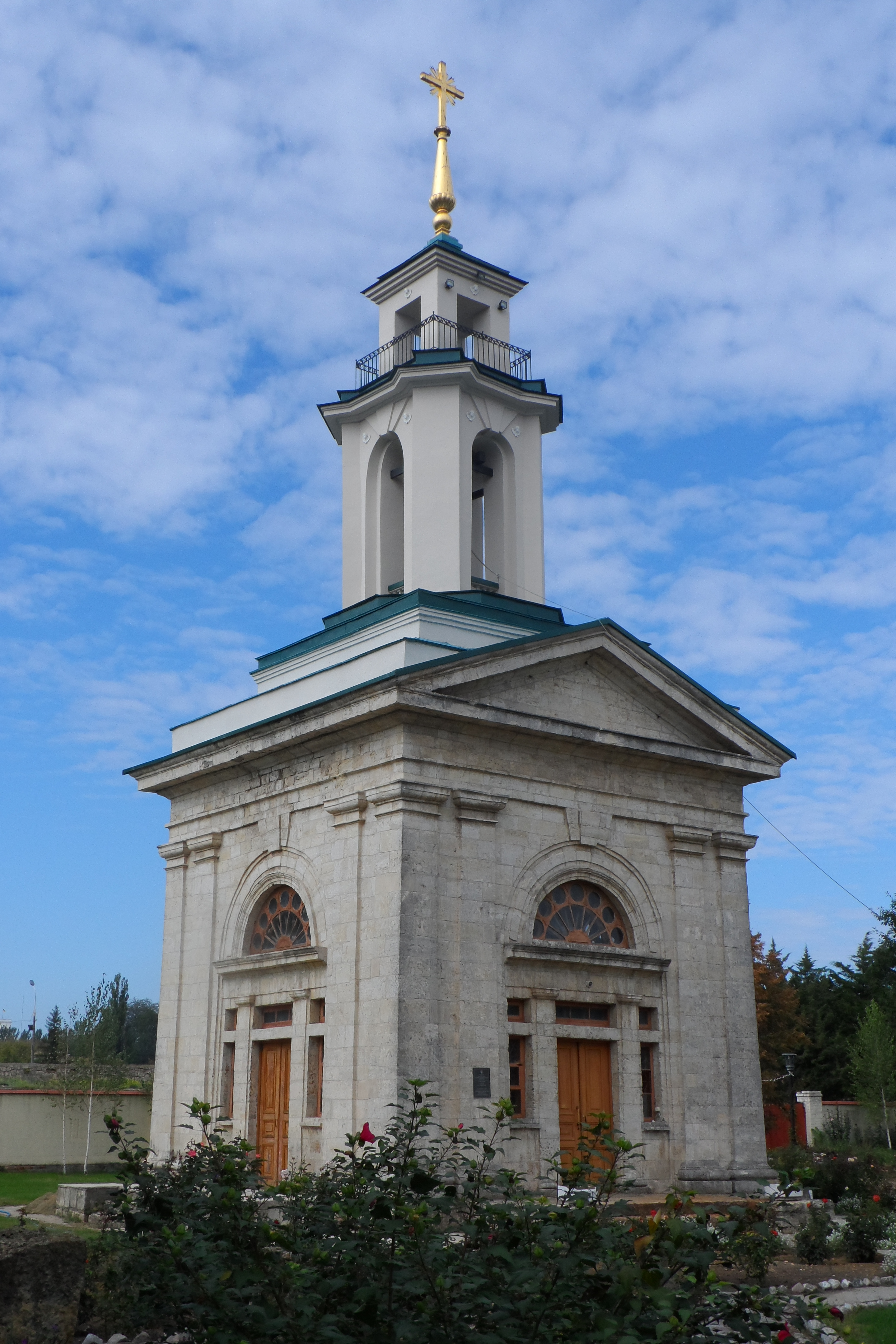 Дзвіниця Катерининського собору (мур.), Херсон, Перекопська вул., 13